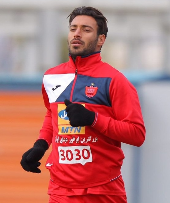 شجاع خلیل‌زاده در تمرینات تیم فوتبال پرسپولیس